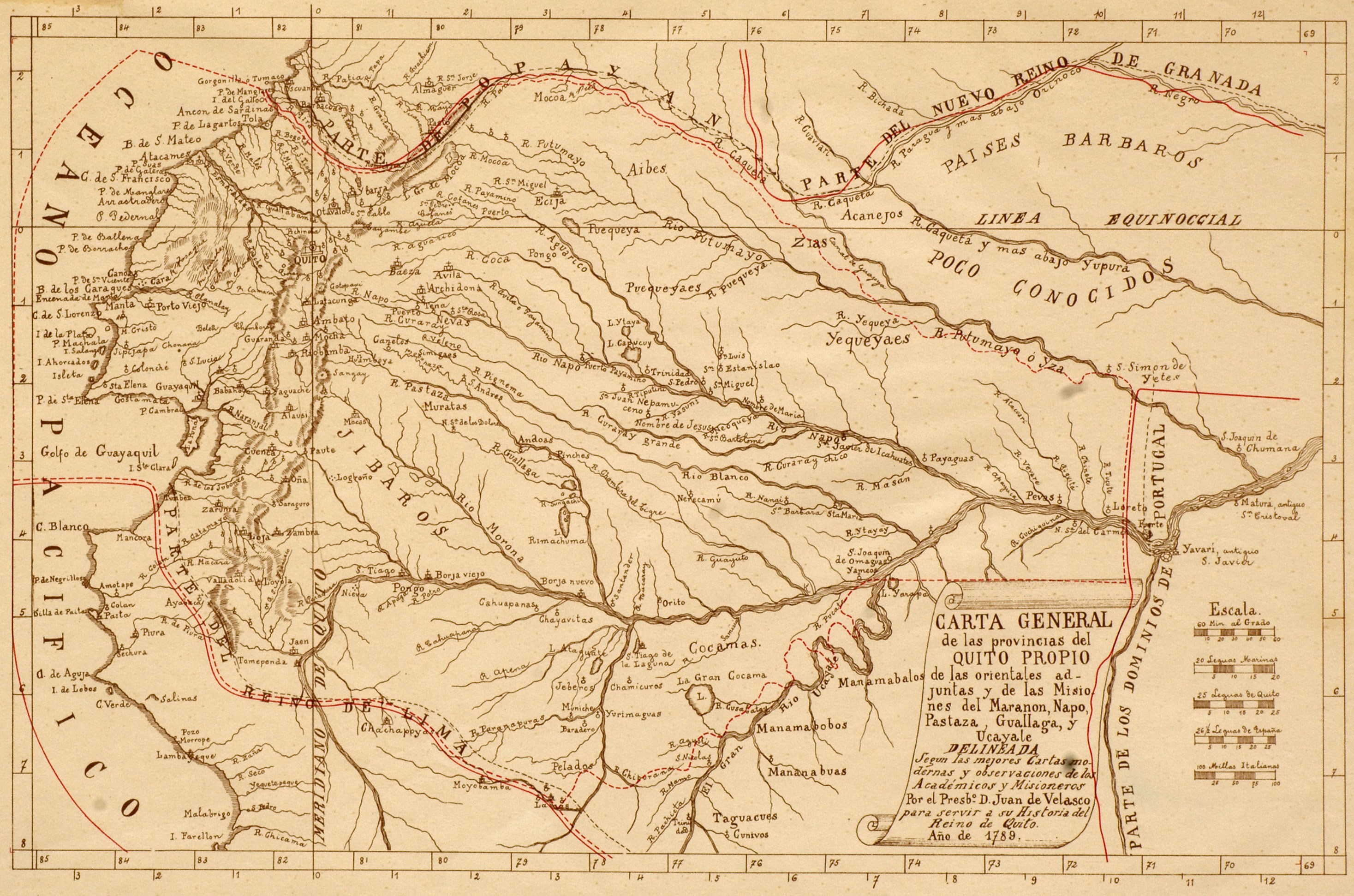 Diapositiva de acceso público consultada del ejemplar original que se custodia en los Fondos Bibliográficos y Cartográfico (Sección: Historia de América Latina) del Archivo Histórico del Guayas (AHG) - Guayaquil, Ecuador.Consultado y compartido por el usuario J. Javier García A.